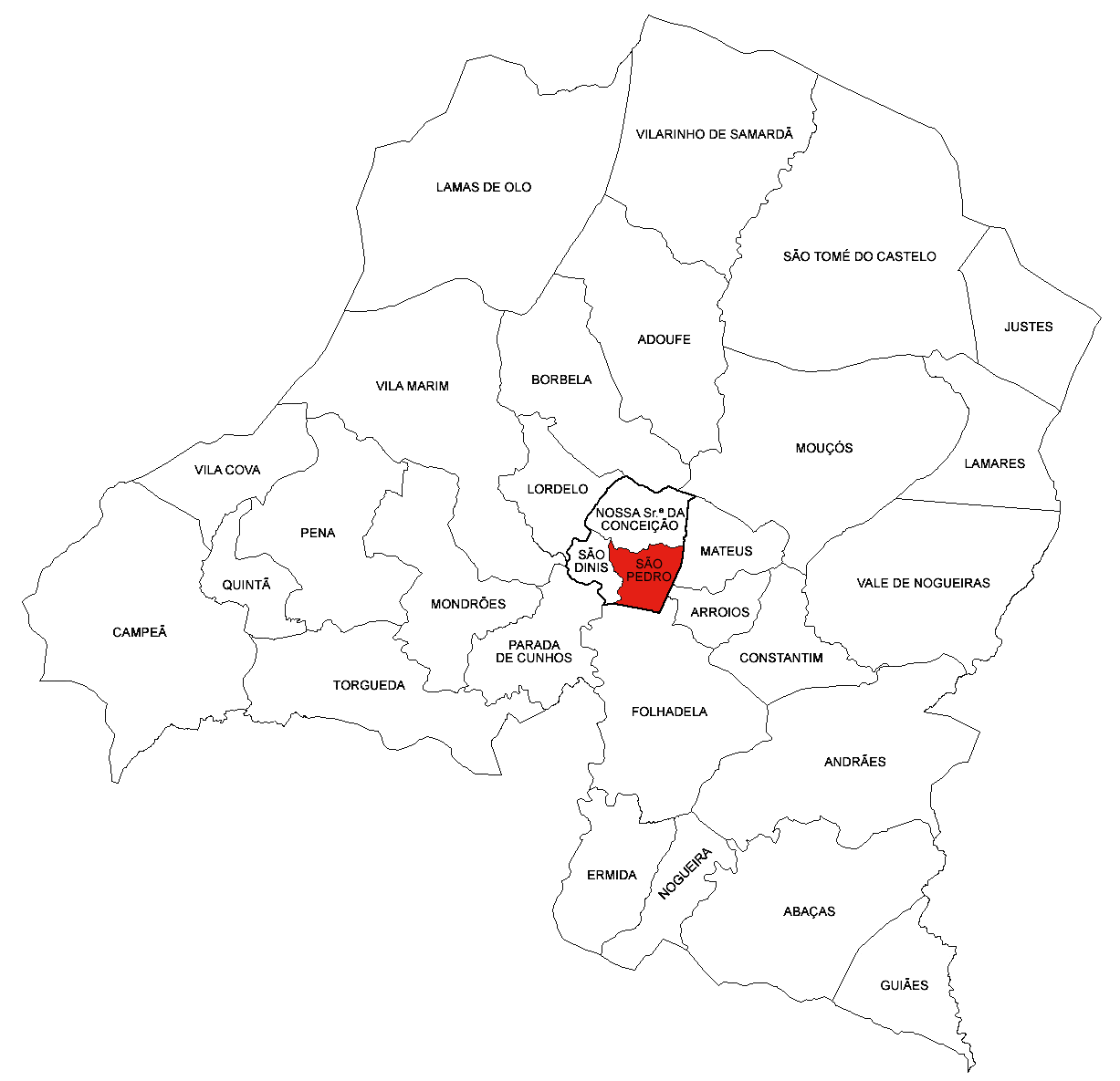 Freguesia de São Pedro (concelho de Vila Real)